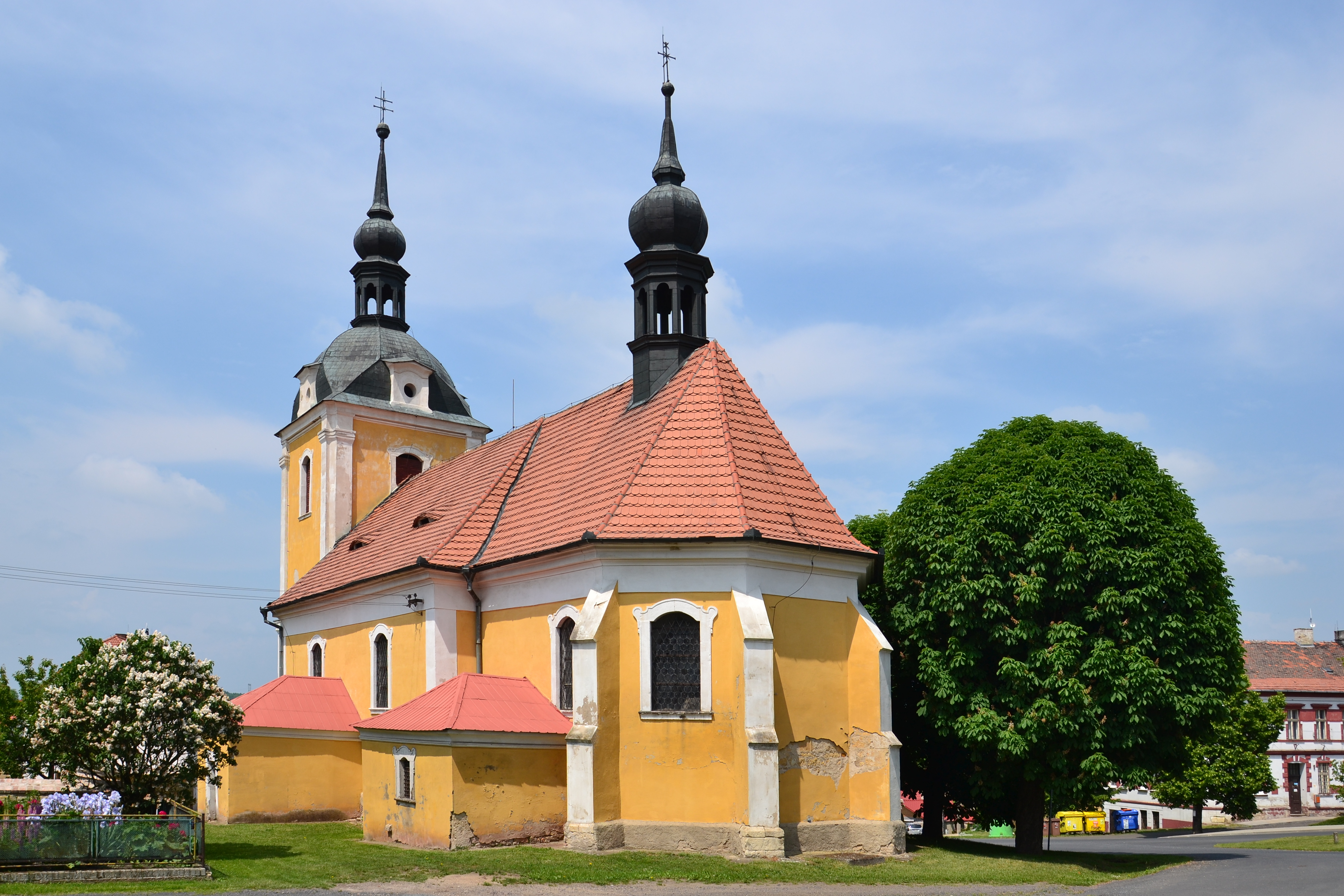 Kostel svatého Martina, Kozly (okres Louny).